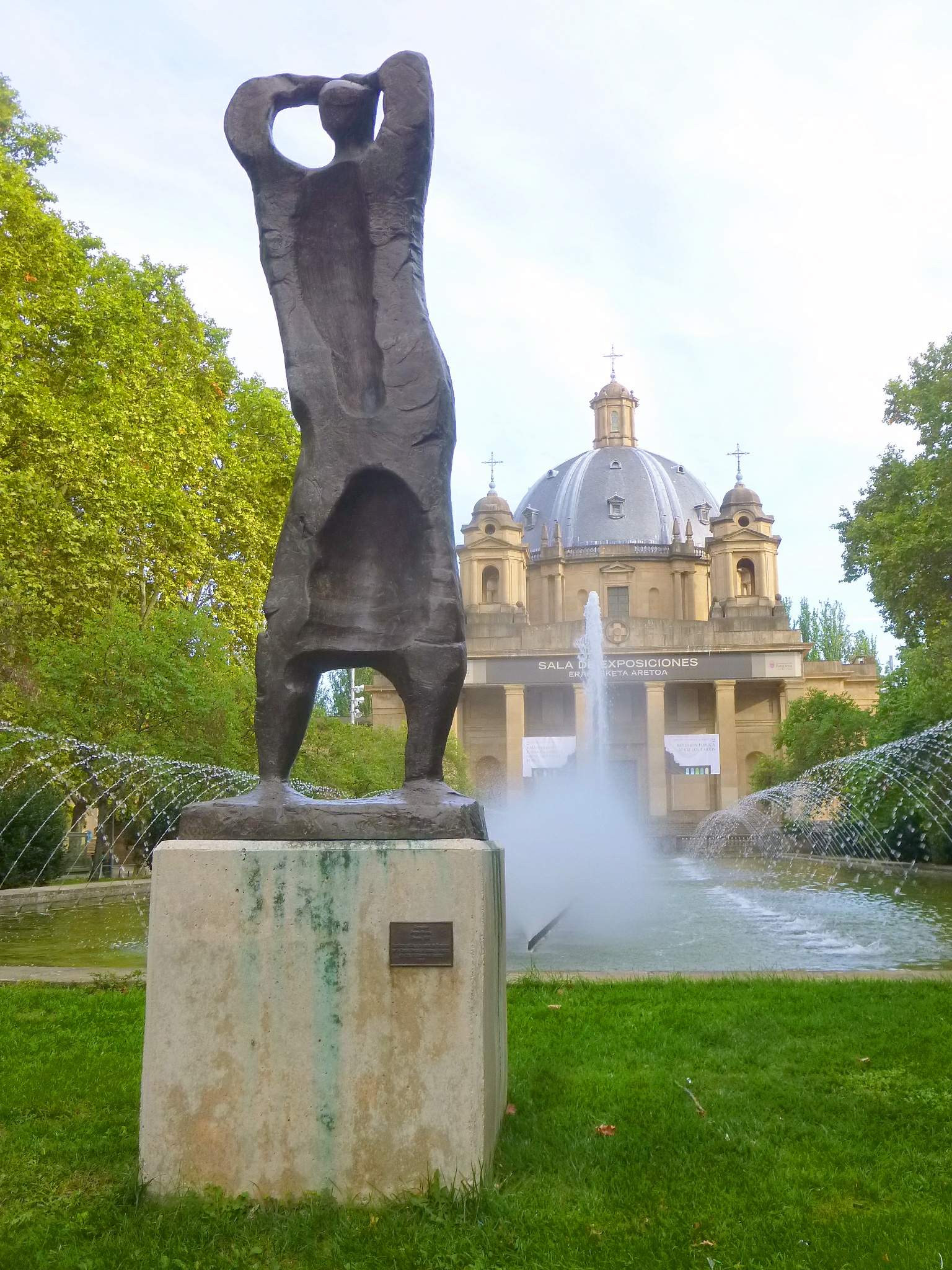 Escultura de Jorge Oteiza en la Plaza de la Libertad de Pamplona